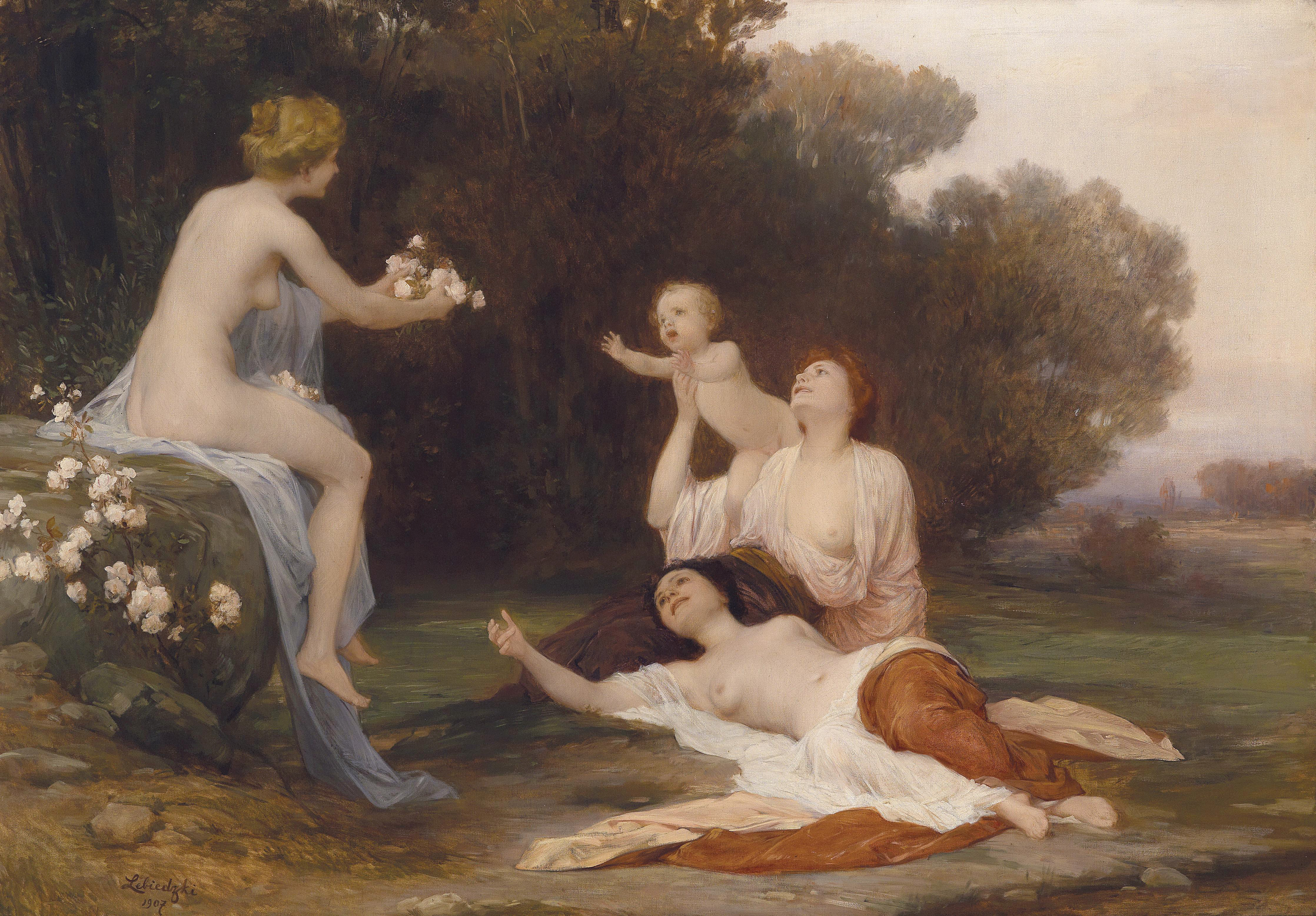 "Idylle", signiert und datiert Lebiedzki 1907, rückseitig Reste eines Künstlerhausetiketts 1917/1419 bzw. 190.../114 sowie Ausstellungsetikett Kunstverein Dresden, rückseitig eigenhändige Betitelung, Öl auf Leinwand, 88,5 x 124,5 cm